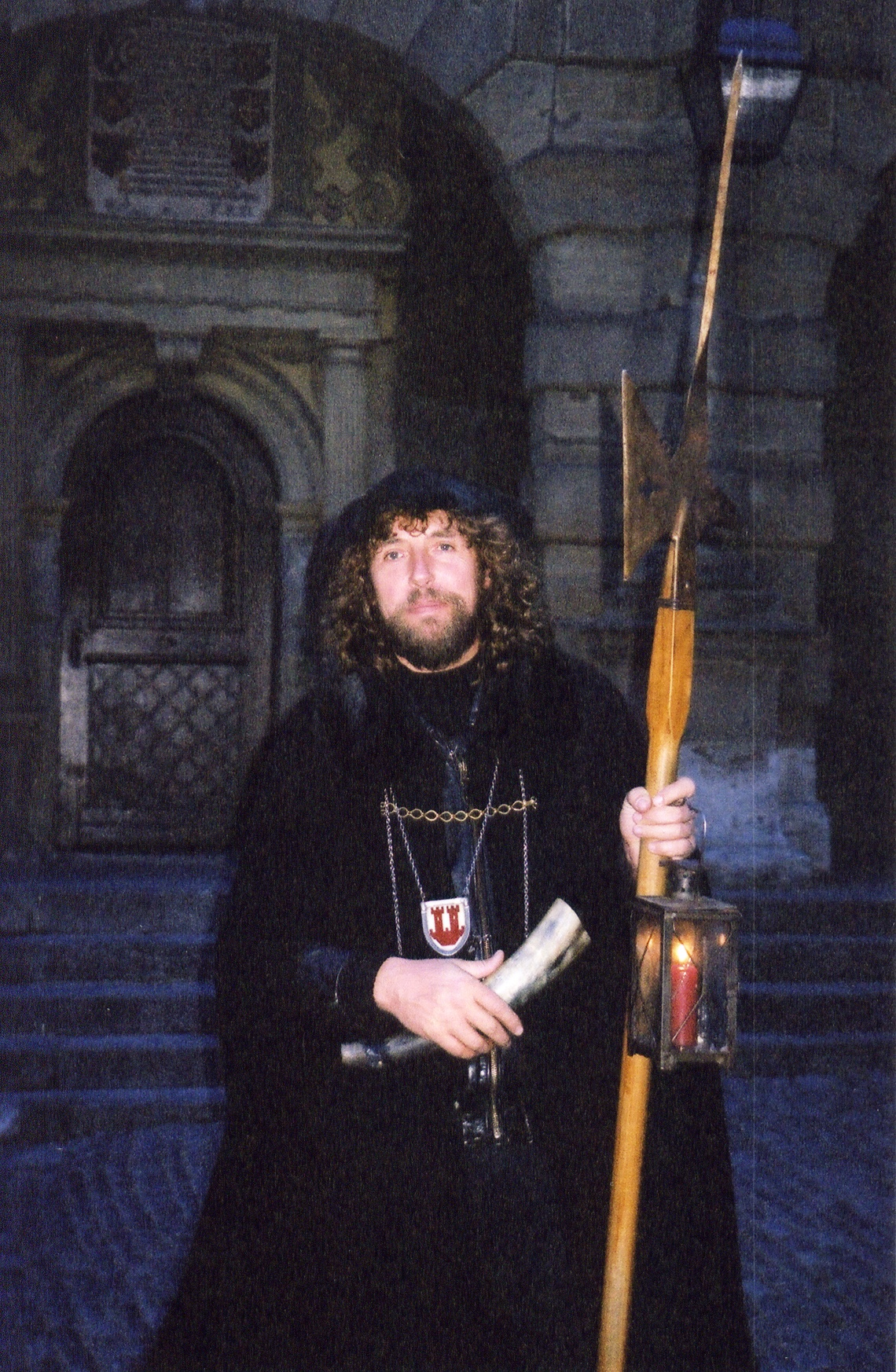 Mittelalterlicher Nachtwächter, der täglich Führungen durch Rothenburg ob der Tauber anbietet.